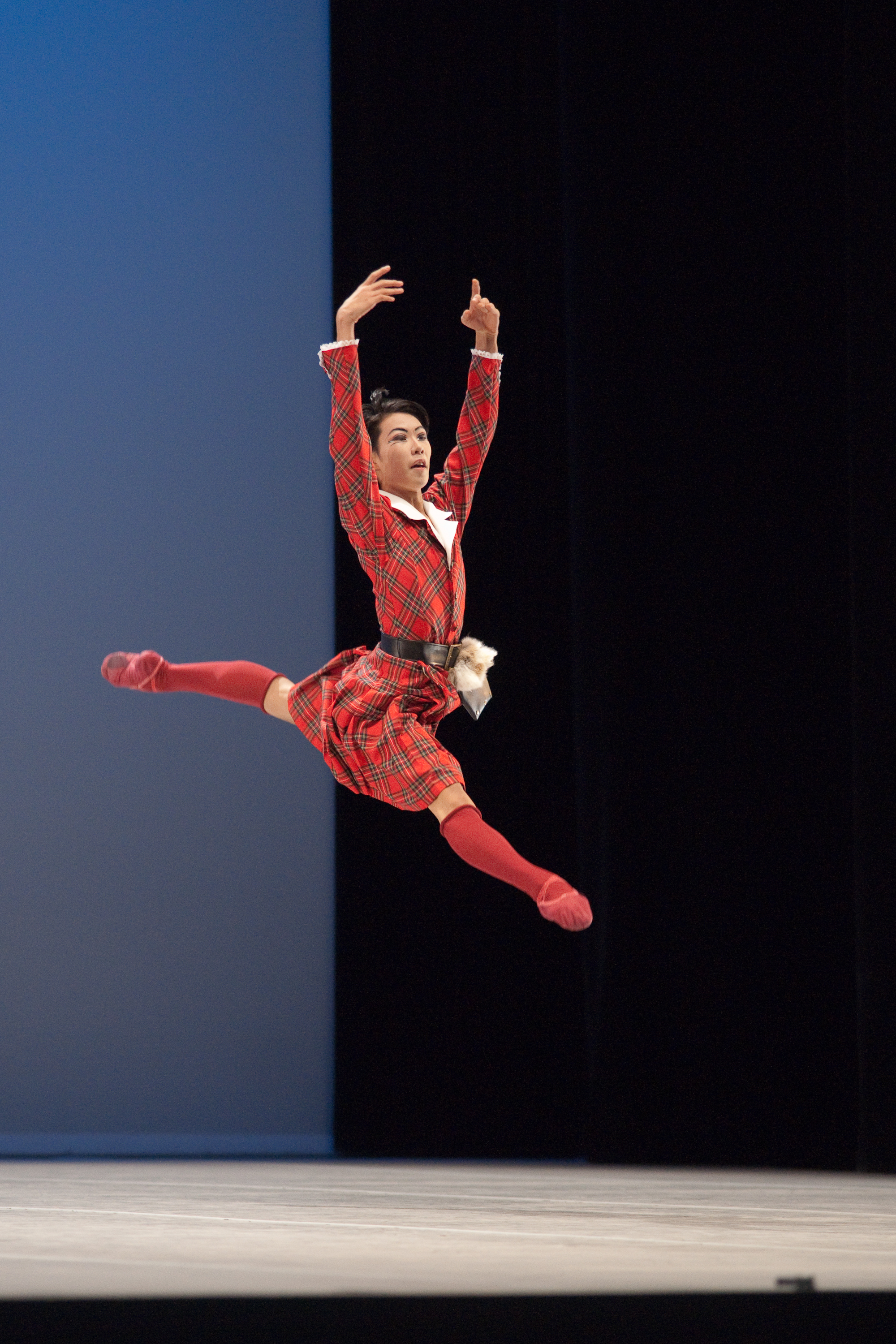 Variation extraite de La Sylphide au Prix de Lausanne 2010. The making of this document was supported by Wikimedia CH. (Submit your project!) For all the files concerned, please see the category Supported by Wikimedia CH.